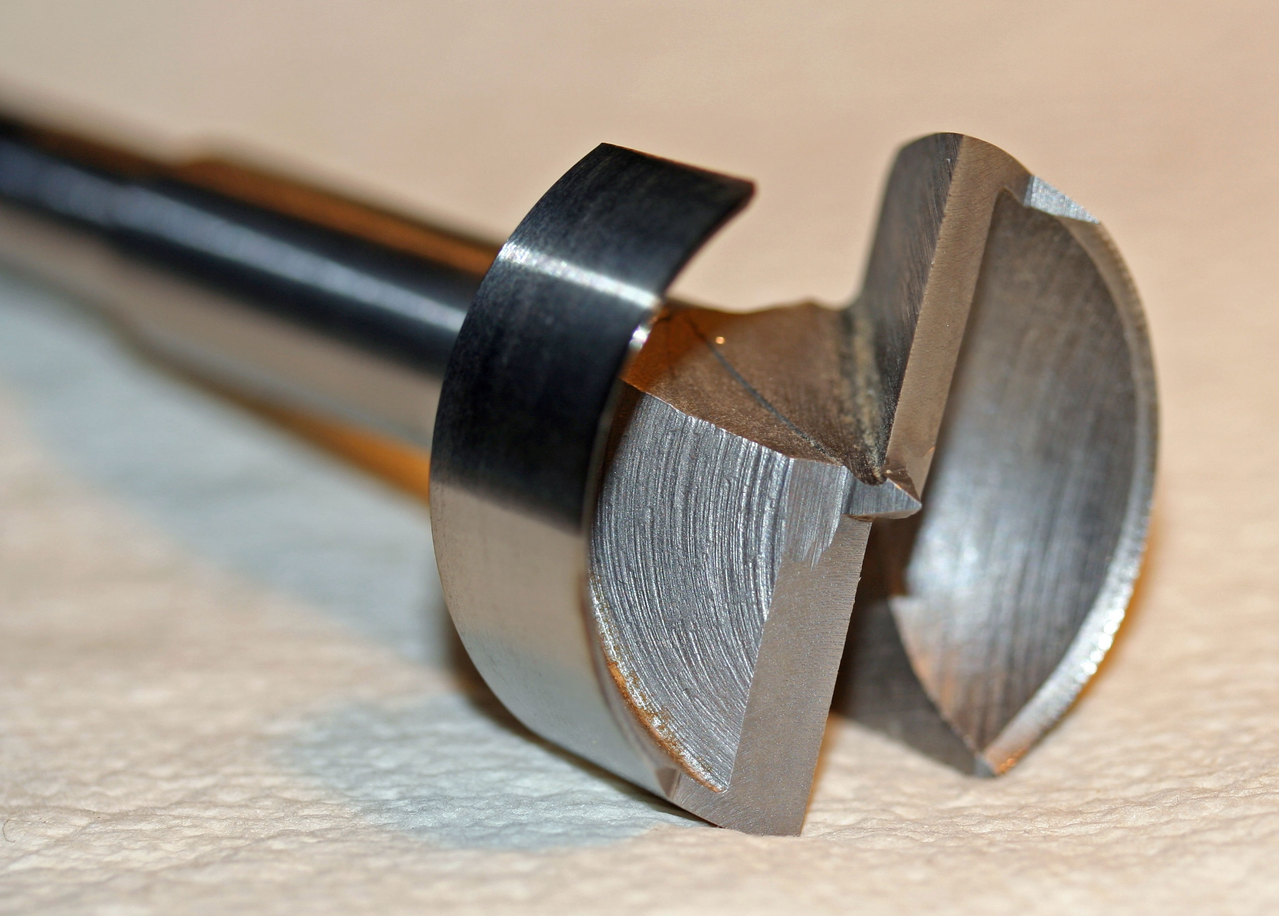 Forstnerbuer.